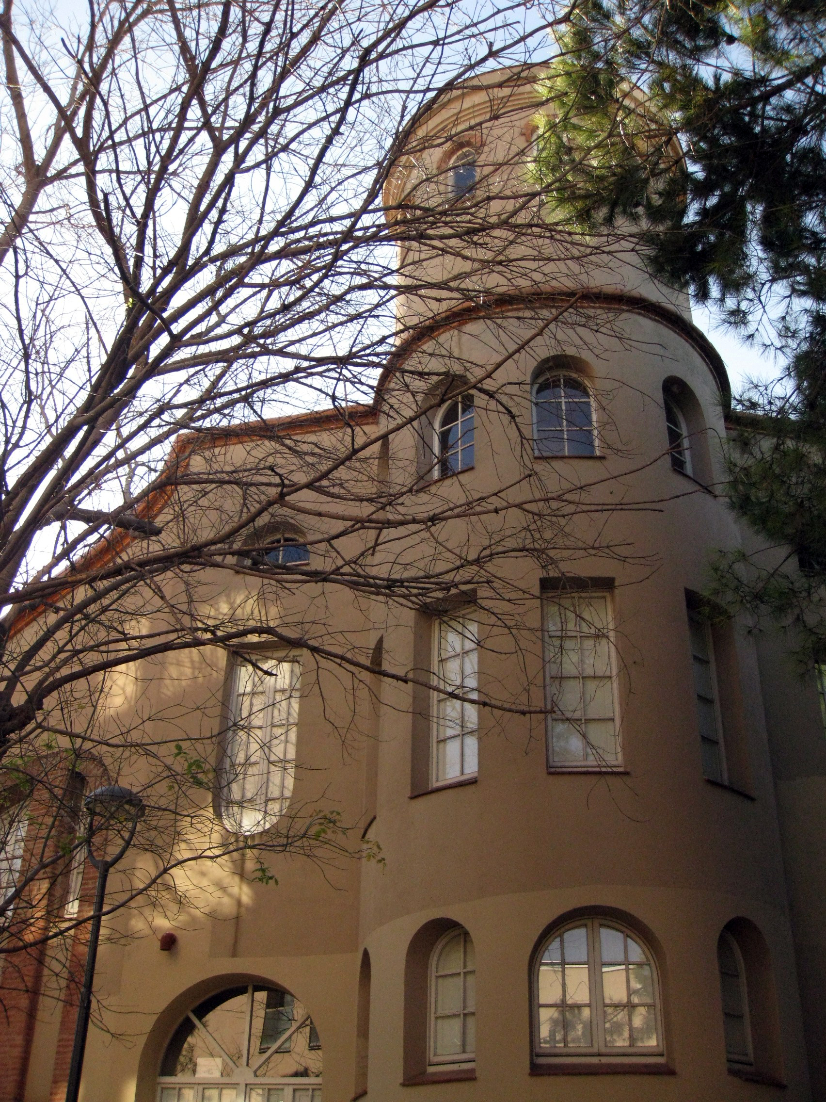 Parc de Desinfecció (Terrassa)